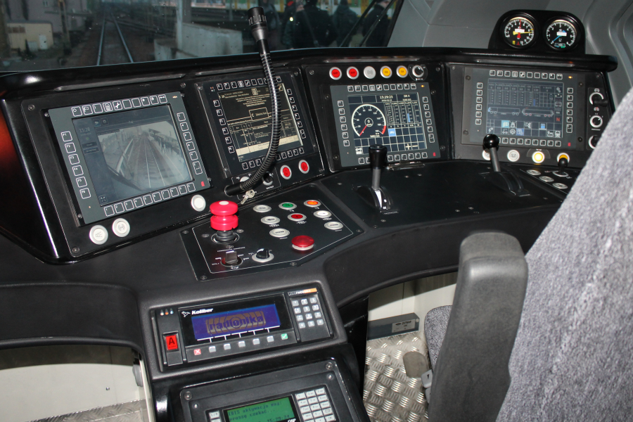 Kokpit piętrowego wagonu sterowniczego Pesa Sundeck 316B-002.